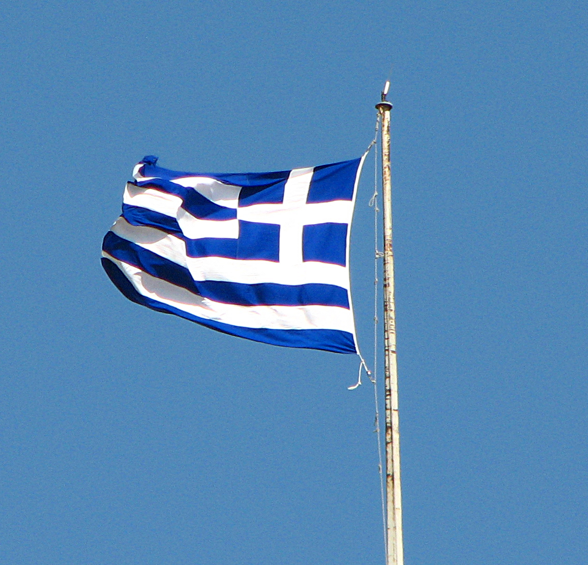 Greek flag